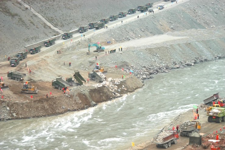 截流过程1